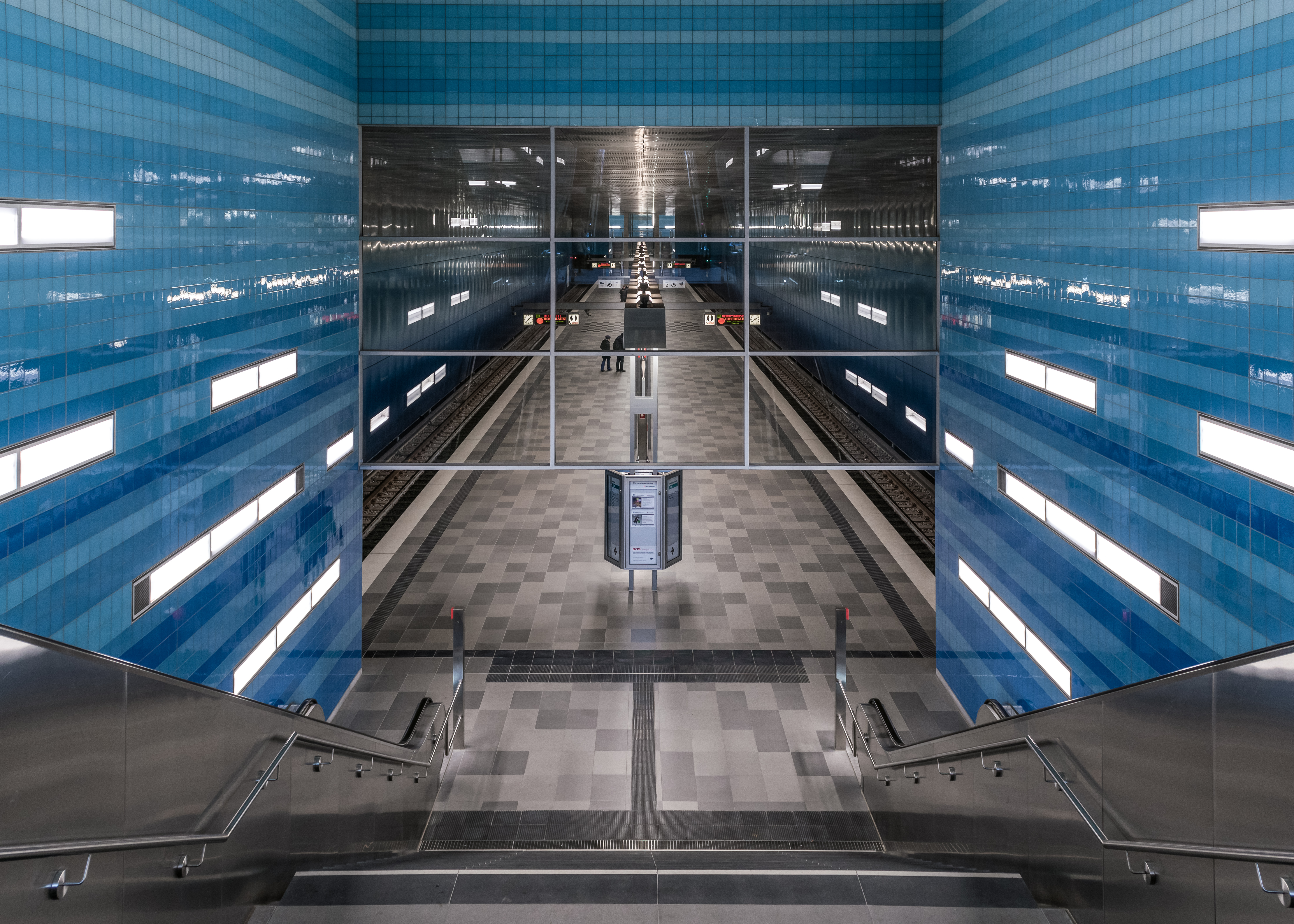 Der Bahnsteig des Hamburger U-Bahnhofes Überseequartier gesehen vom westlichen Eingang